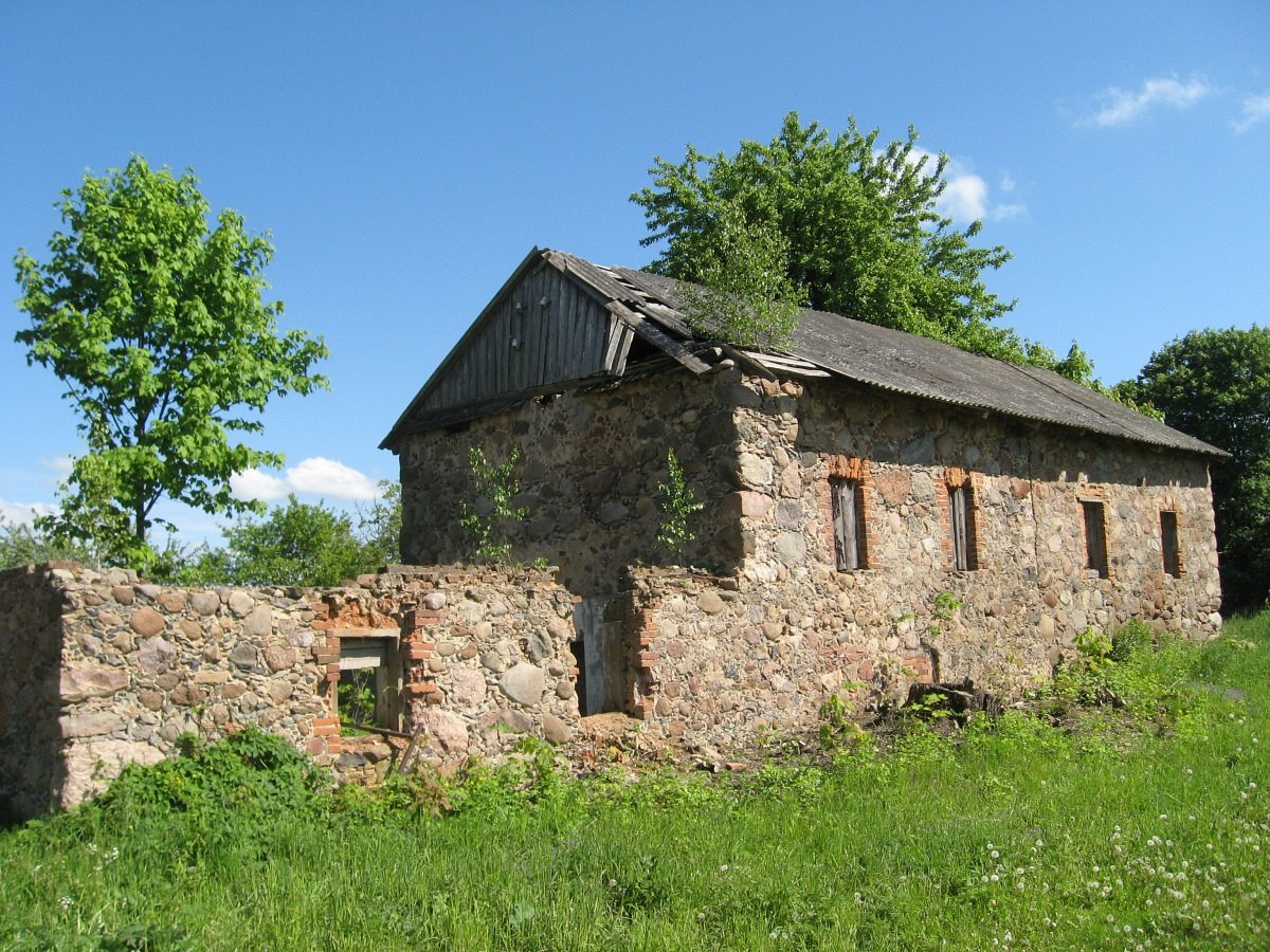 Бабоўня. Гаспадарчая пабудова